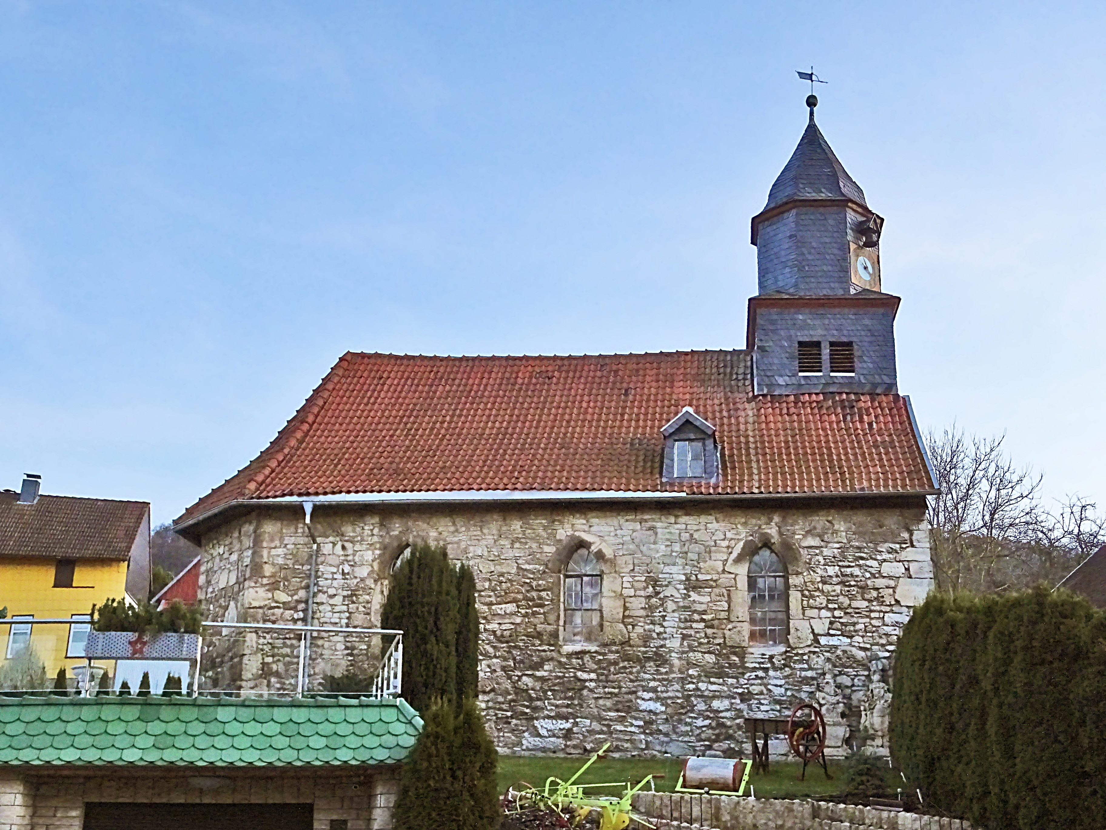 Dorfkirche Kraja von Norden gesehen